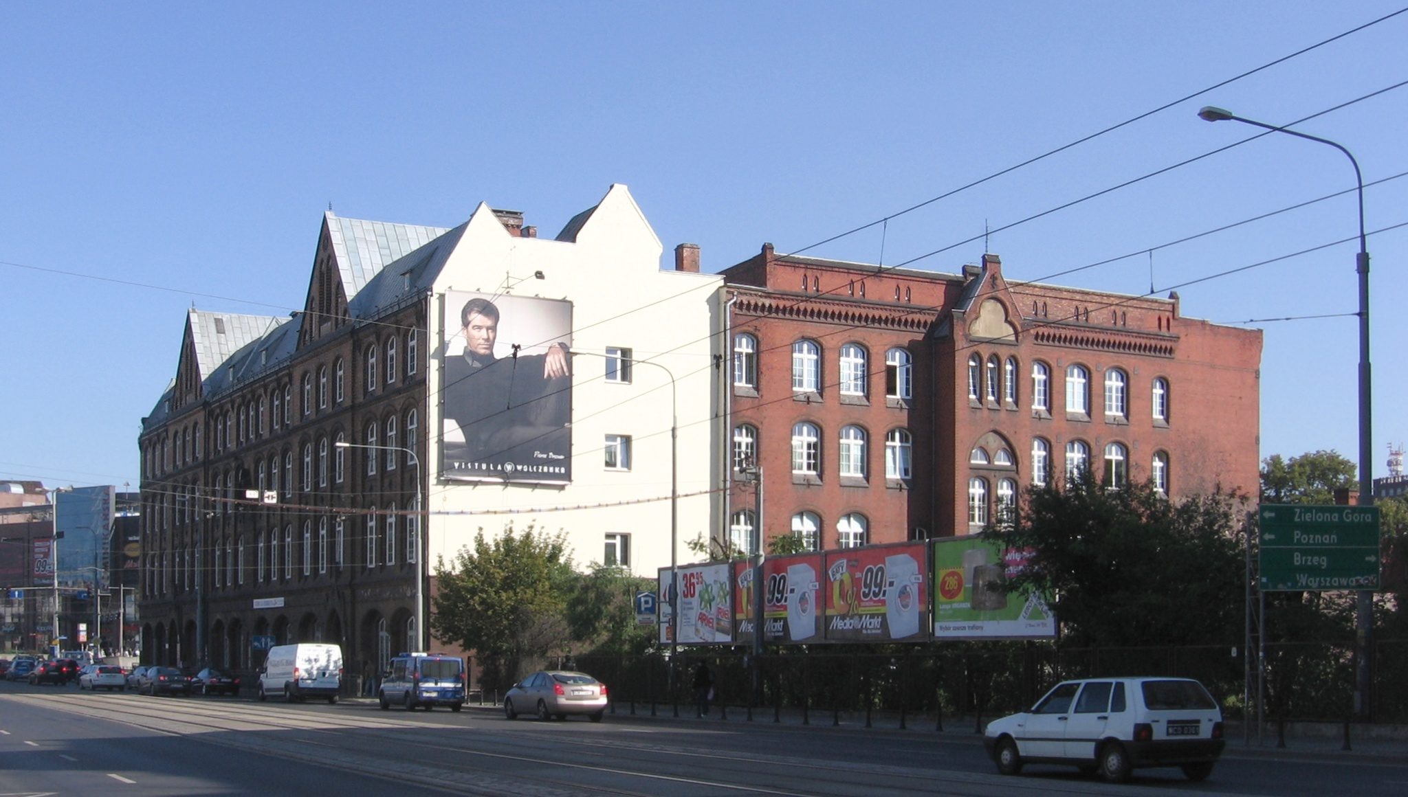 IX liceum we Wrocławiu